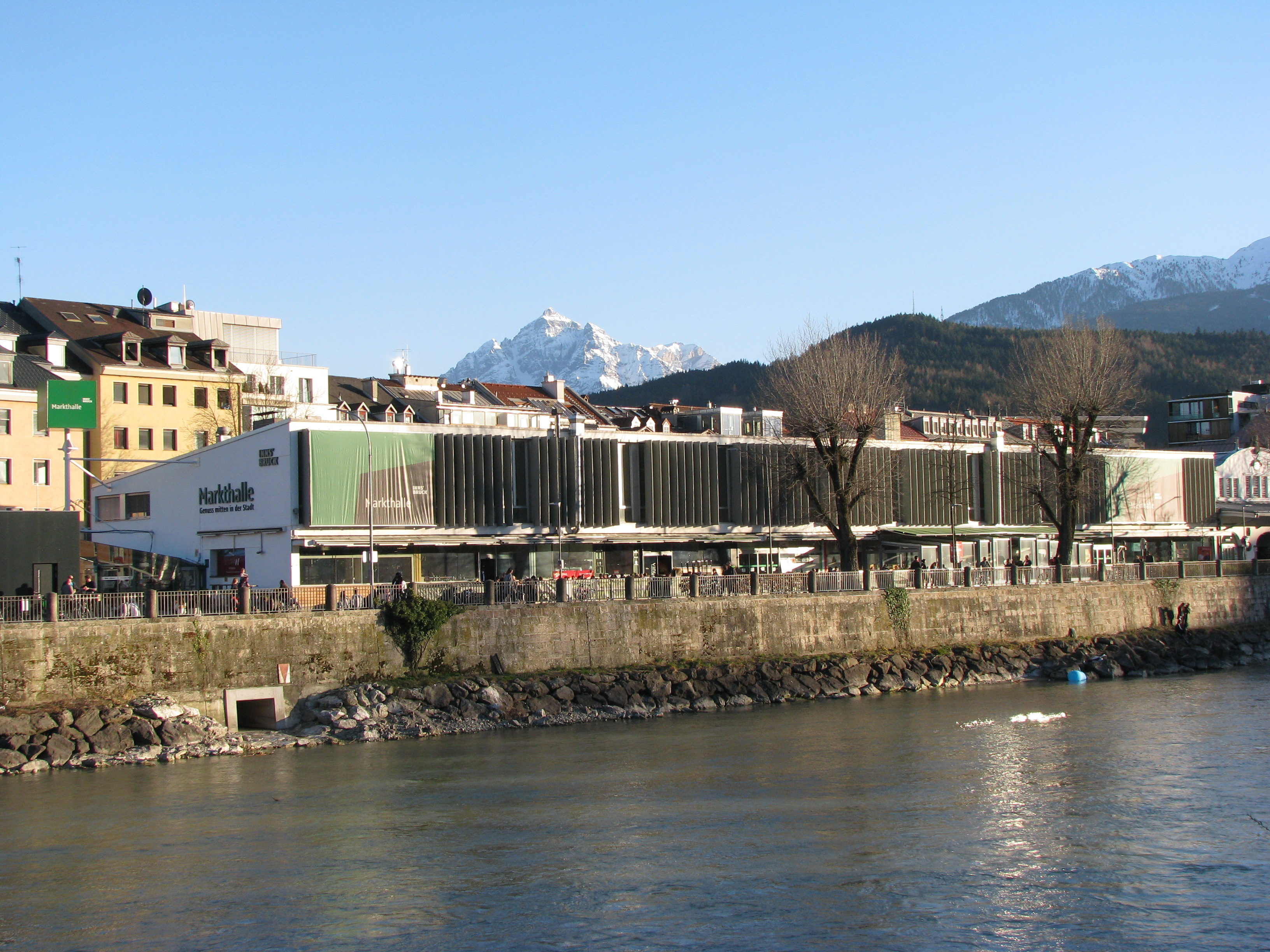 Markthalle Innsbruck This media shows the remarkable cultural object in the Austrian state of Tyrol listed by the Tyrolean Art Cadastre with the ID 2144. (on tirisMaps, on tirisdienste.at, pdf, more images on Commons)